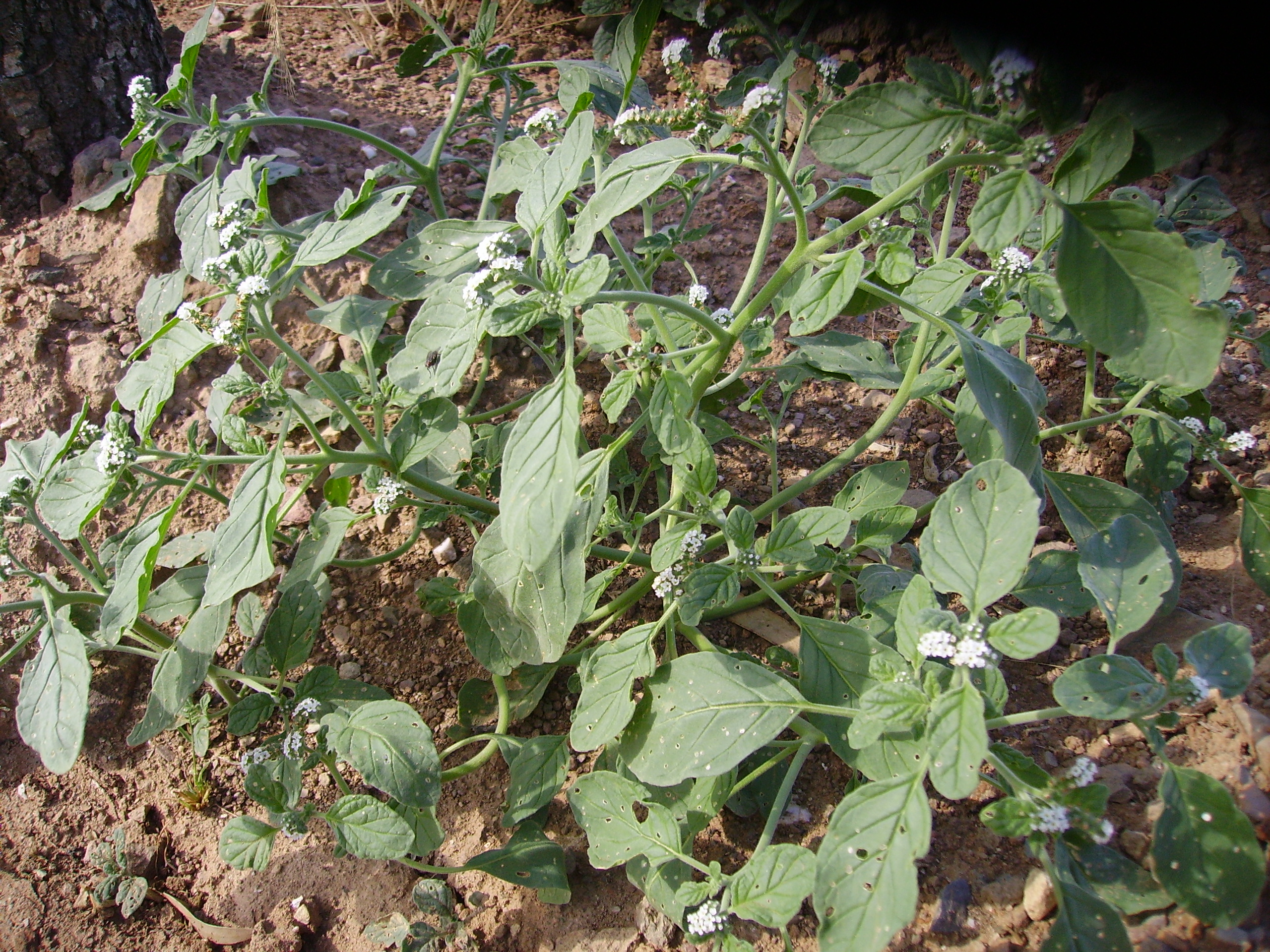 Heliotropium europaeum, fotografiada en el Andévalo por Alejandro Ibáñez el 18/06/2007, al pie de una encina.